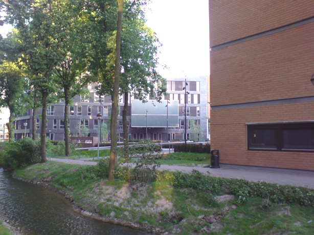 Foto van De Bisschoppen te Utrecht gemaakt door Marcel de Koning